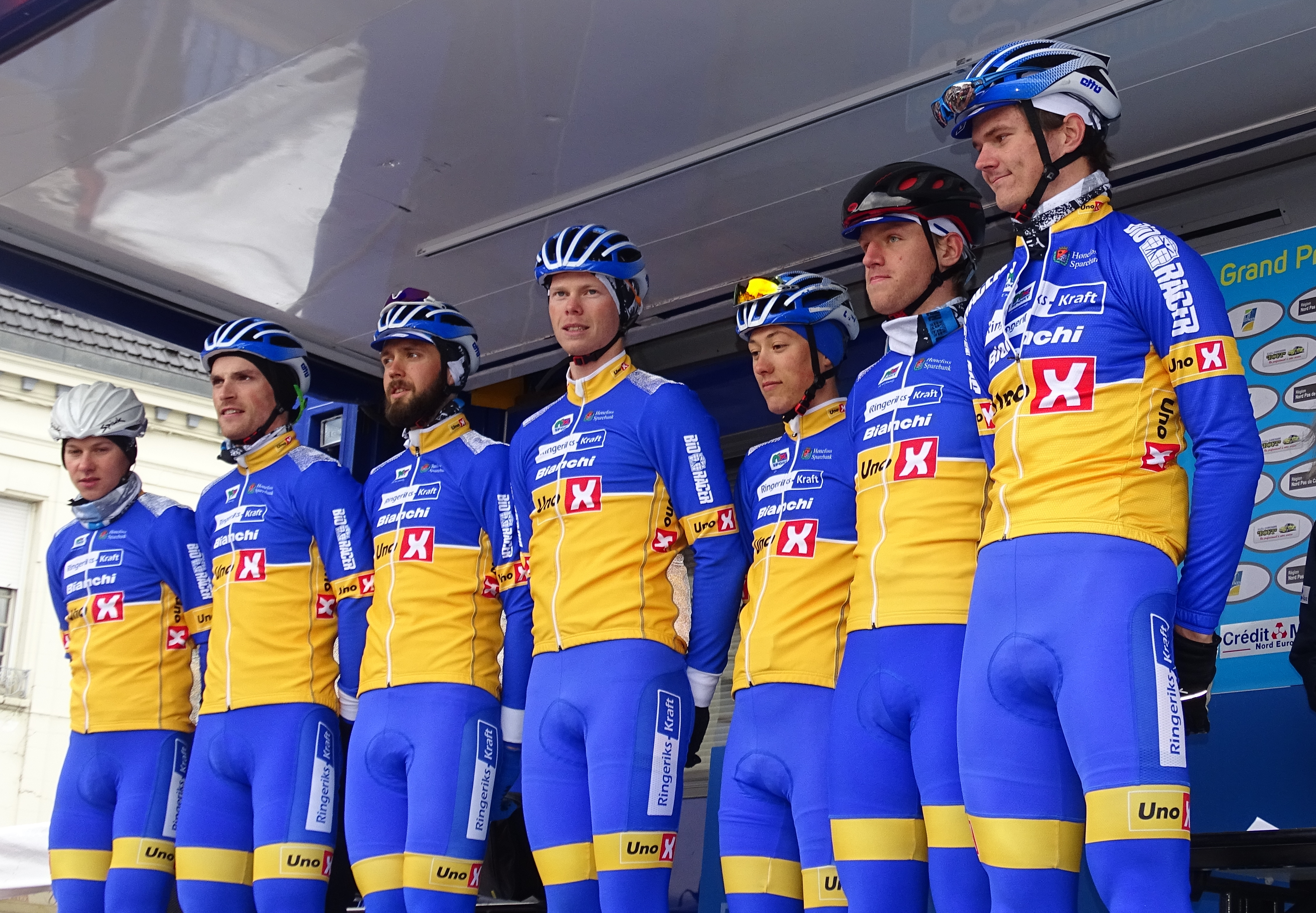 Reportage réalisé le dimanche 6 mars à l'occasion du départ et de l'arrivée du Grand Prix de Lillers-Souvenir Bruno Comini 2016 à Lillers, Pas-de-Calais, Nord-Pas-de-Calais, France.